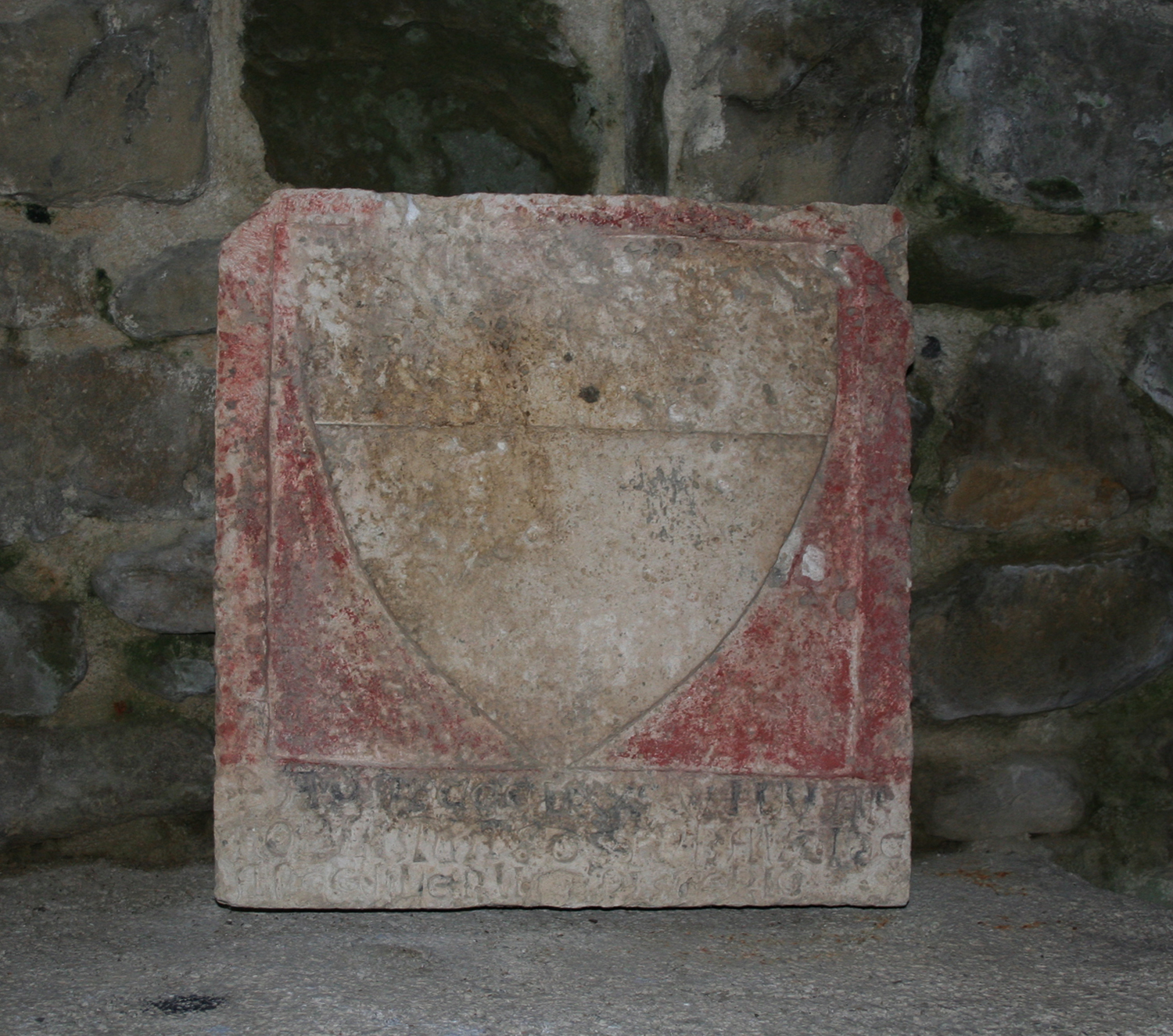 Stemma araldico, datato 1389, appartenuto al nobile guerriero Sinbialdo Cancellieri di Pistoia, rinvenuto durante i lavori di restauro del 1992 all'interno della Rocca di Arquta del Tronto, in provincia di Ascoli Piceno. Un sentito ringraziamento all'Amministrazione Comunale e alla Pro Loco di Arquata del Tronto per lo scatto di questa immagine.